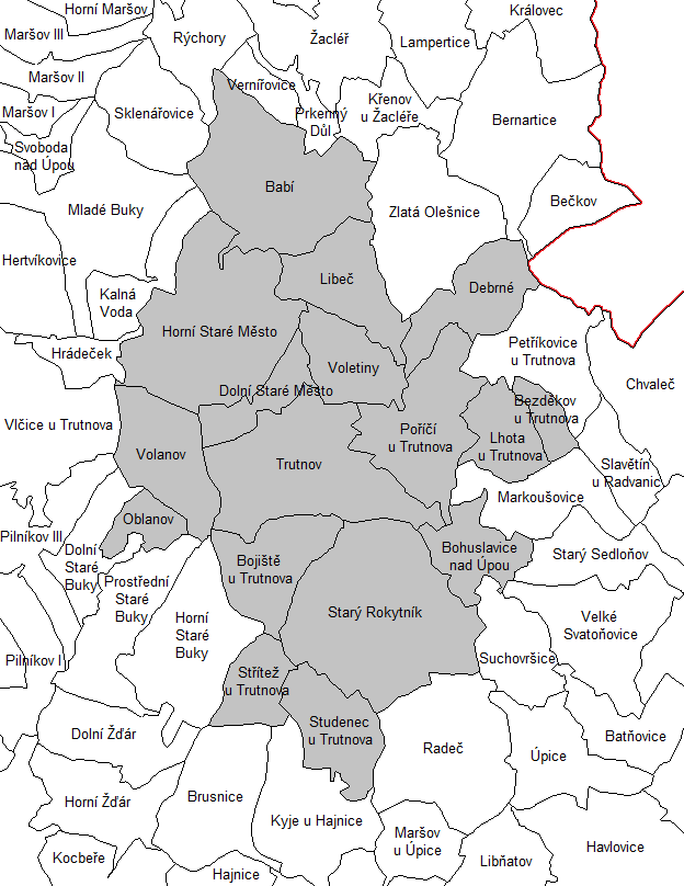 Katastrální mapa Trutnova a okolí